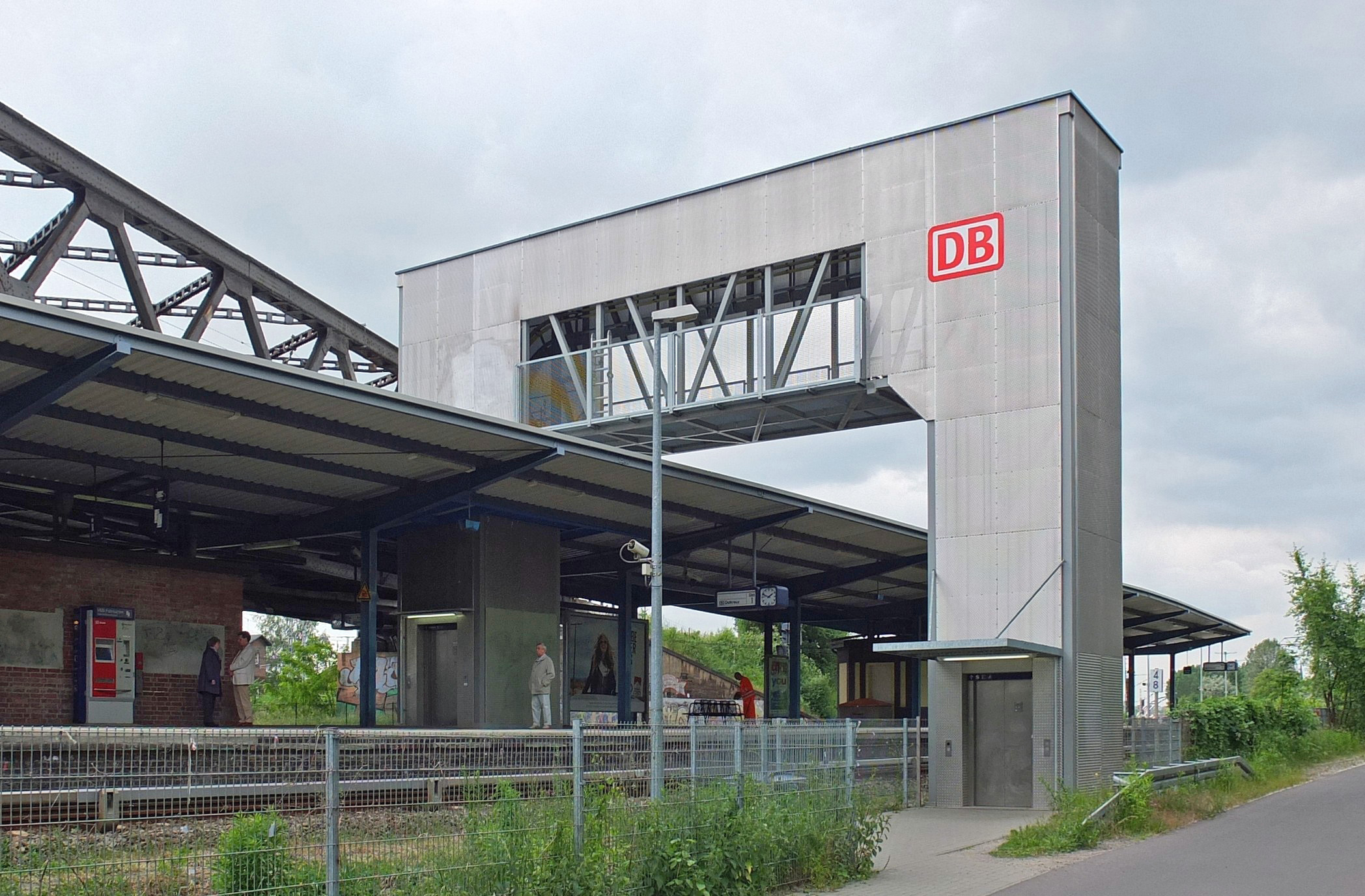 Peoplemover für den barrierefreien Zugang auf den S-Bhf Betriebsbahnhof Rummelsburg in Berlin